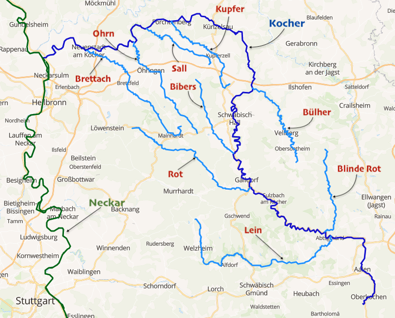 carte réalisée sur umap This map may be incomplete, and may contain errors. Don't rely solely on it for navigation.